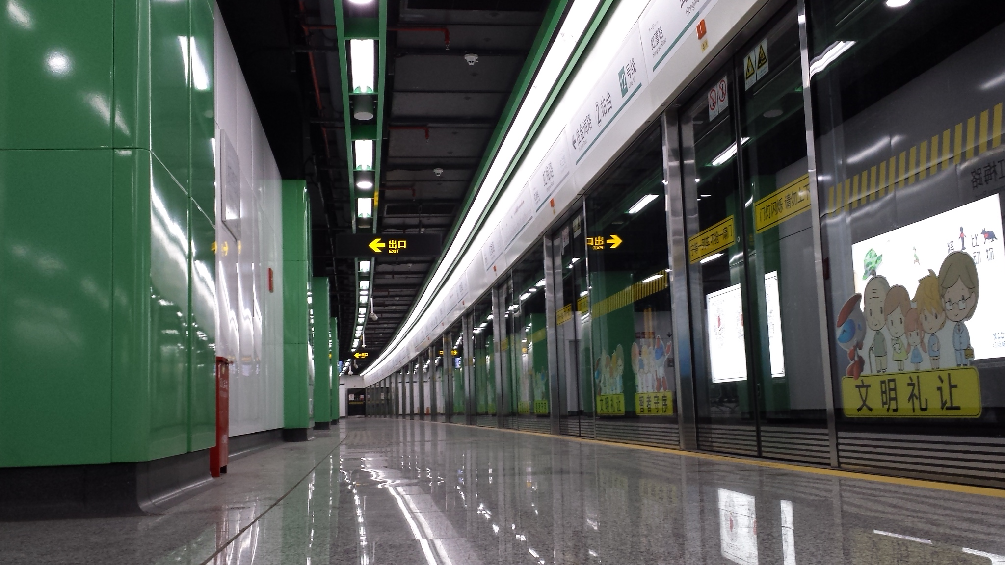 上海地铁12号线虹梅路站